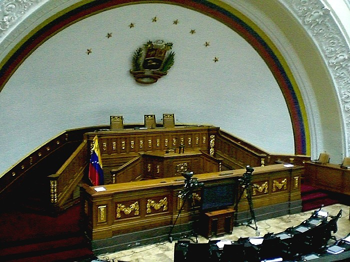 Hemiciclio Protocolar, Palacio Federal Legislativo, Caracas.